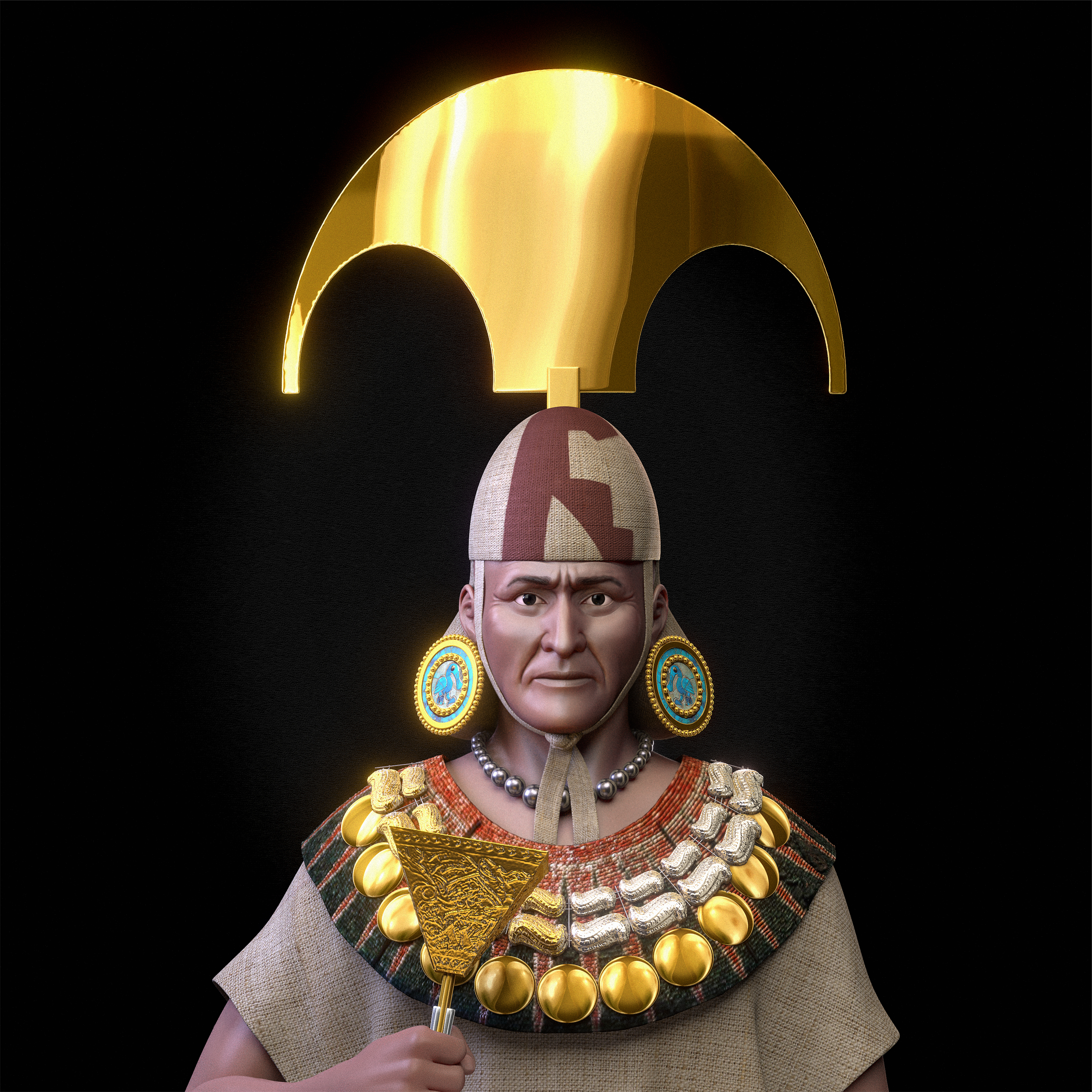 A reconstrução facial do Senhor de Sipán foi um projeto organizado pela Universidad Inca Garcilaso de la Vega (UIGV), pelo Museu Tumbas Reales de Sipán e pela Equipe Brasileira de Antropologia Forense e Odontologia Lega - Ebrafol. Na etapa referente a apresentação do busto, participaram do porjeto o CTI Renato Archer de Campinas e a artista plástica Mari Bueno.